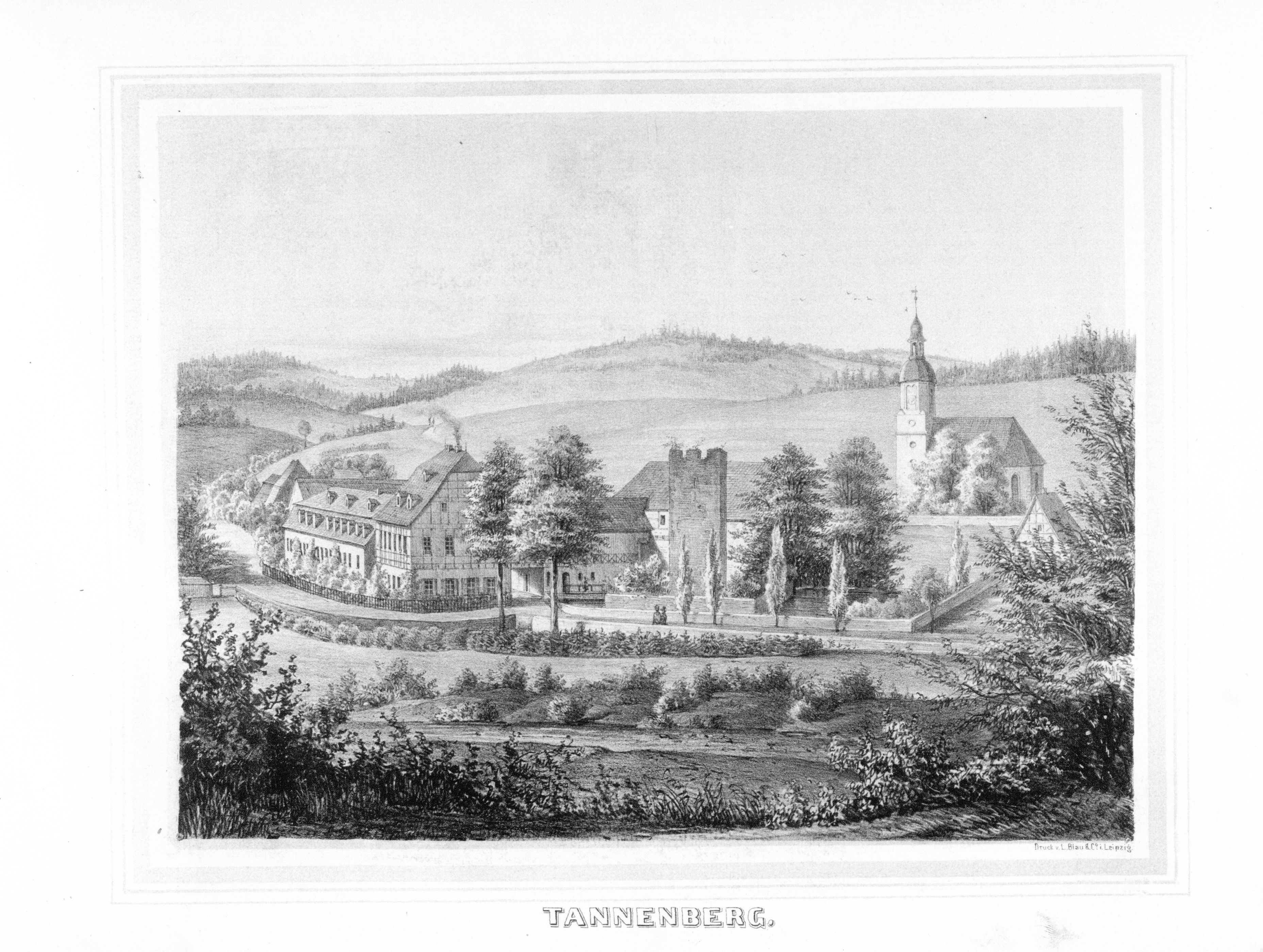 Tannenberg aus: Album der Rittergüter und Schlösser im Königreiche Sachsen Erzgebirgischer Kreis Section: IV